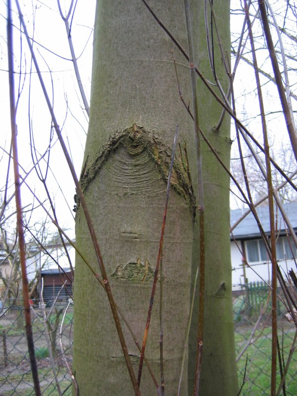 Rinde des Silber-Ahorns Acer saccharinum